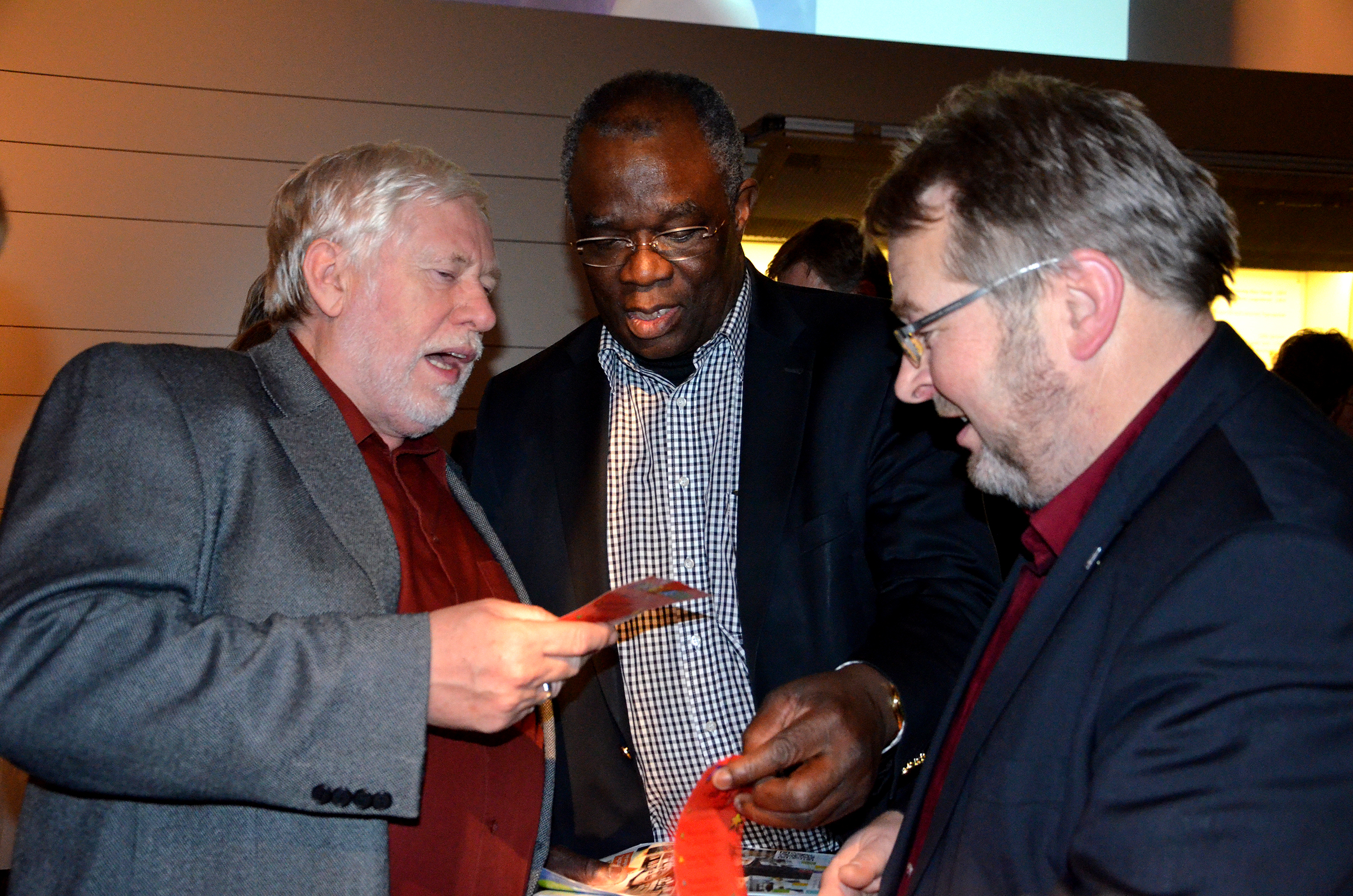 Die Feierlichkeiten zur Verleihung der beiden Stadtkulturpreise durch den Freundeskreis Hannover und der beiden Sonderpreise für herausragendes bürgerschaftliches Engagement sind noch (lange) nicht zu Ende, da wird schon über die nächsten Veranstaltungen gesprochen (von links): Hans Mönninghoff, Abayomi Bankole (unter anderem im Seniorenbeirat der Landeshauptstadt Hannover) sowie SPD-Ratsherr Thomas Hermann ...